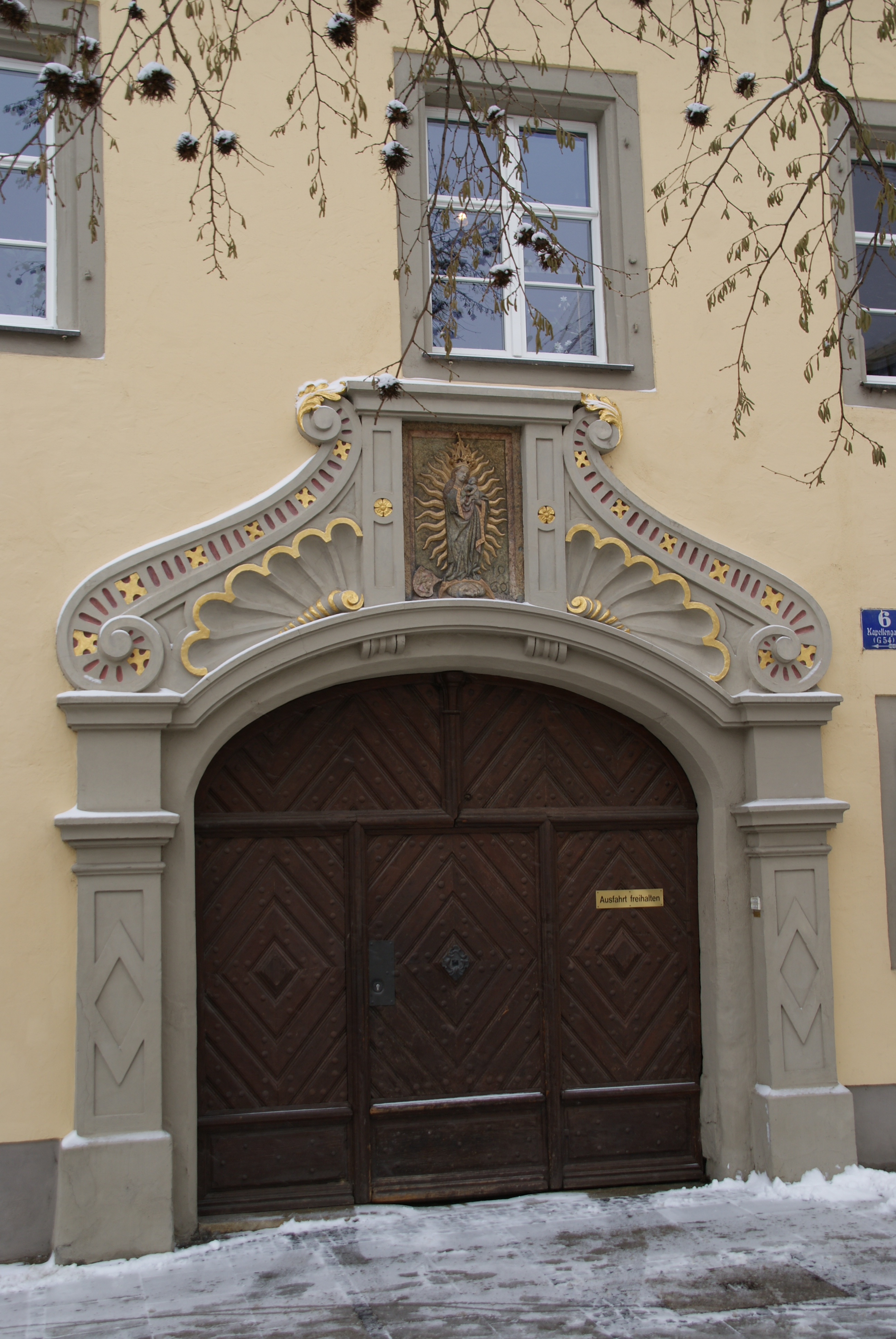 Alte Dechantei der Alten Kapelle, RegensburgThis is a photograph of an architectural monument.